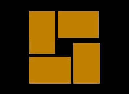 Golden Harvest logo. Op 15 november 2006 door Sindala gemaakt